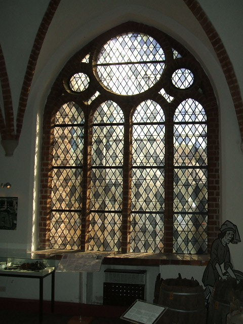 Das Foto zeigt Details des Katharinenklosters in Stralsund im März 2007.